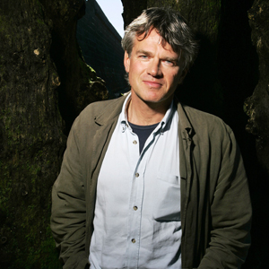 L'écrivain, grand reporter et correspondant de guerre français Olivier Weber en Afghanistan en 2010.